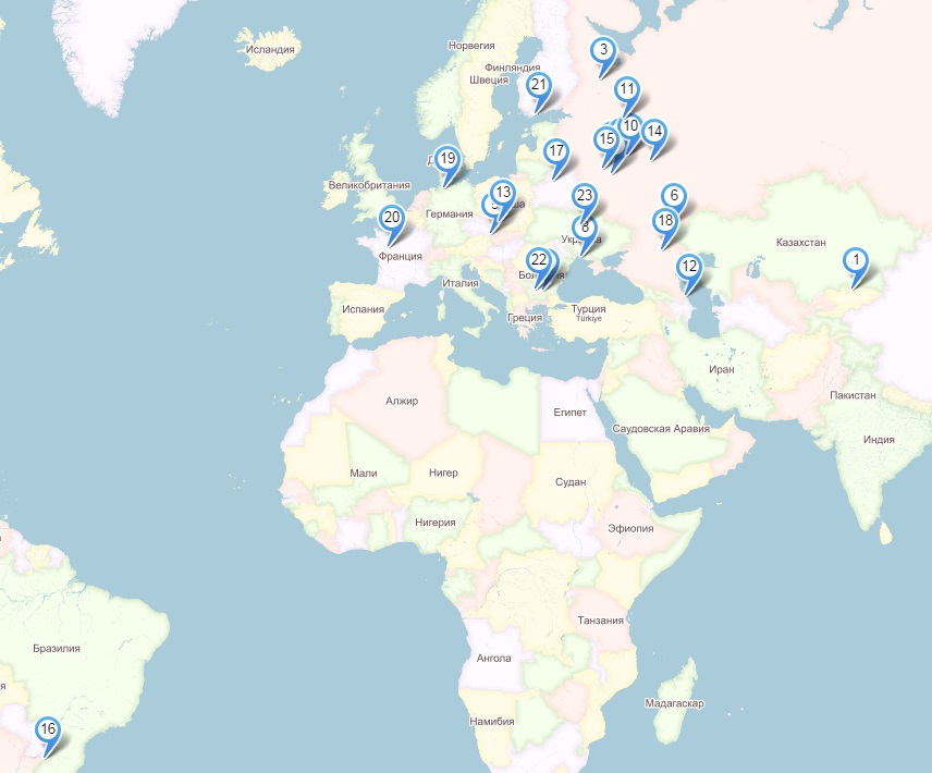 География городов-побратимов Можайска на карте мира